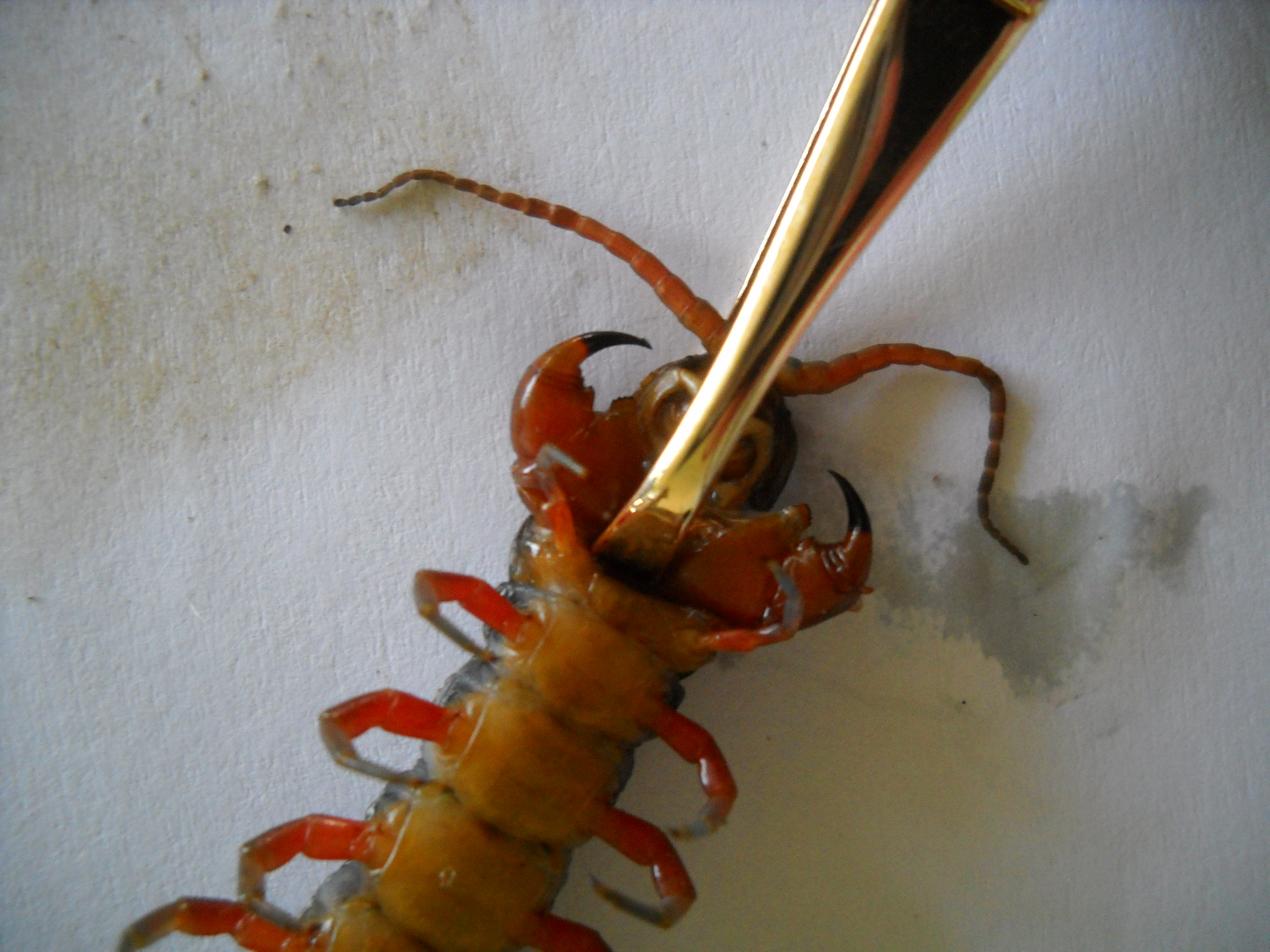 Dard scolopendre